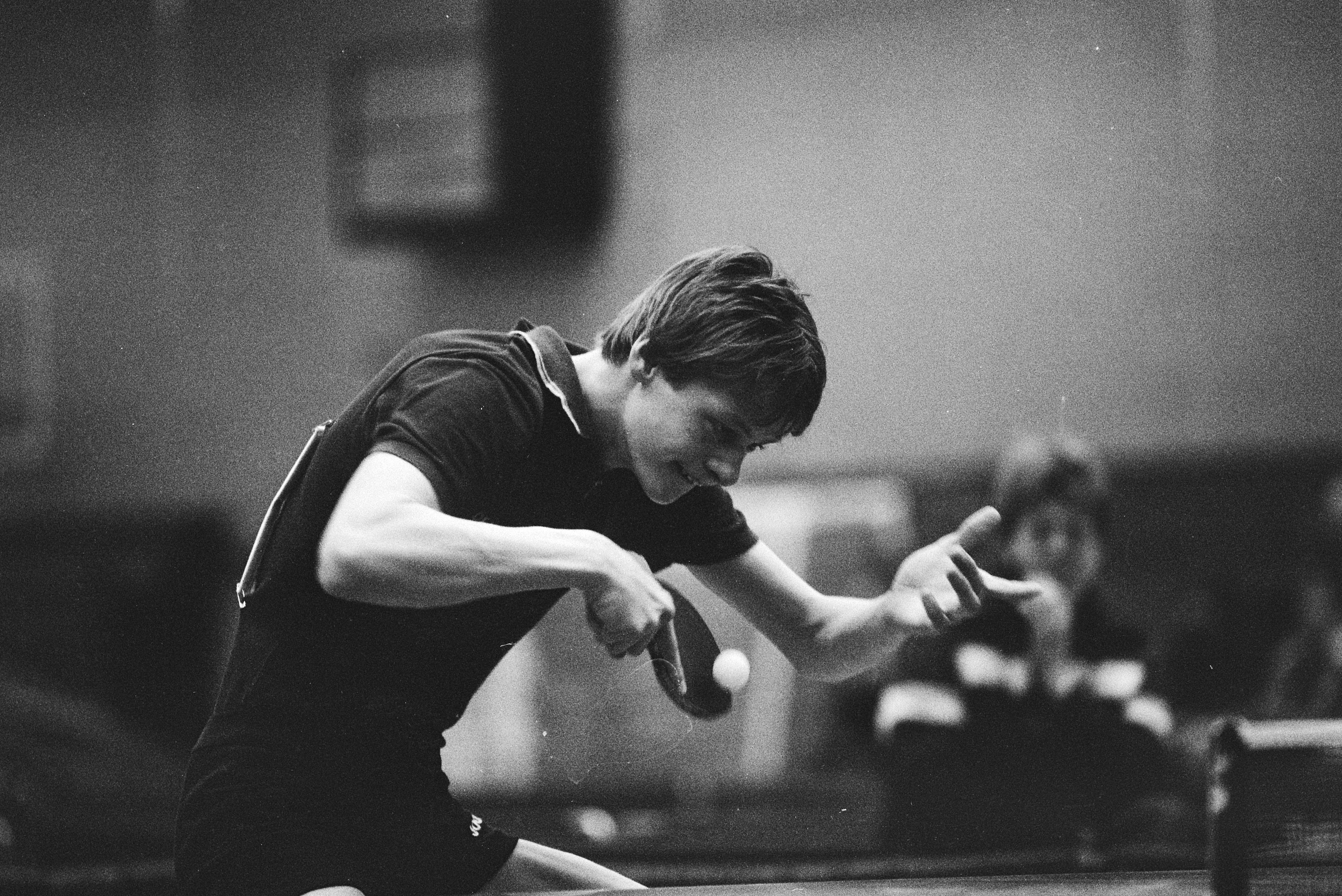 Collectie / Archief : Fotocollectie Anefo Reportage / Serie : Nederlands Kampioenschap Tafeltennis 1983 in Utrecht Beschrijving : Henk van Spanje in actie Datum : 13 maart 1983 Locatie : Utrecht (prov), Utrecht (stad) Trefwoorden : sport, tafeltennis, wedstrijden Persoonsnaam : Spanje, Henk van Fotograaf : Croes, Rob C. / Anefo Auteursrechthebbende : Nationaal Archief Materiaalsoort : Negatief (zwart/wit) Nummer archiefinventaris : bekijk toegang 2.24.01.05 Bestanddeelnummer : 932-5299